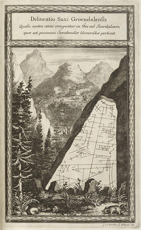 Stenen i Grönan dal, Storlien, Jämtland, foto ur Erik dahlbergs verk "Svecia Antiqua"